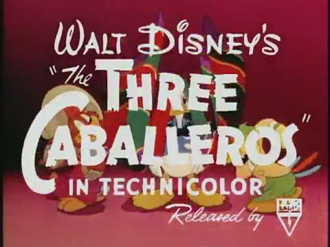 Imatges del tràiler de la pel·lícula "Los Tres Caballeros". Els tràilers de les pel·lícules publicats abans de 1964 als Estats Units es troben en domini públic